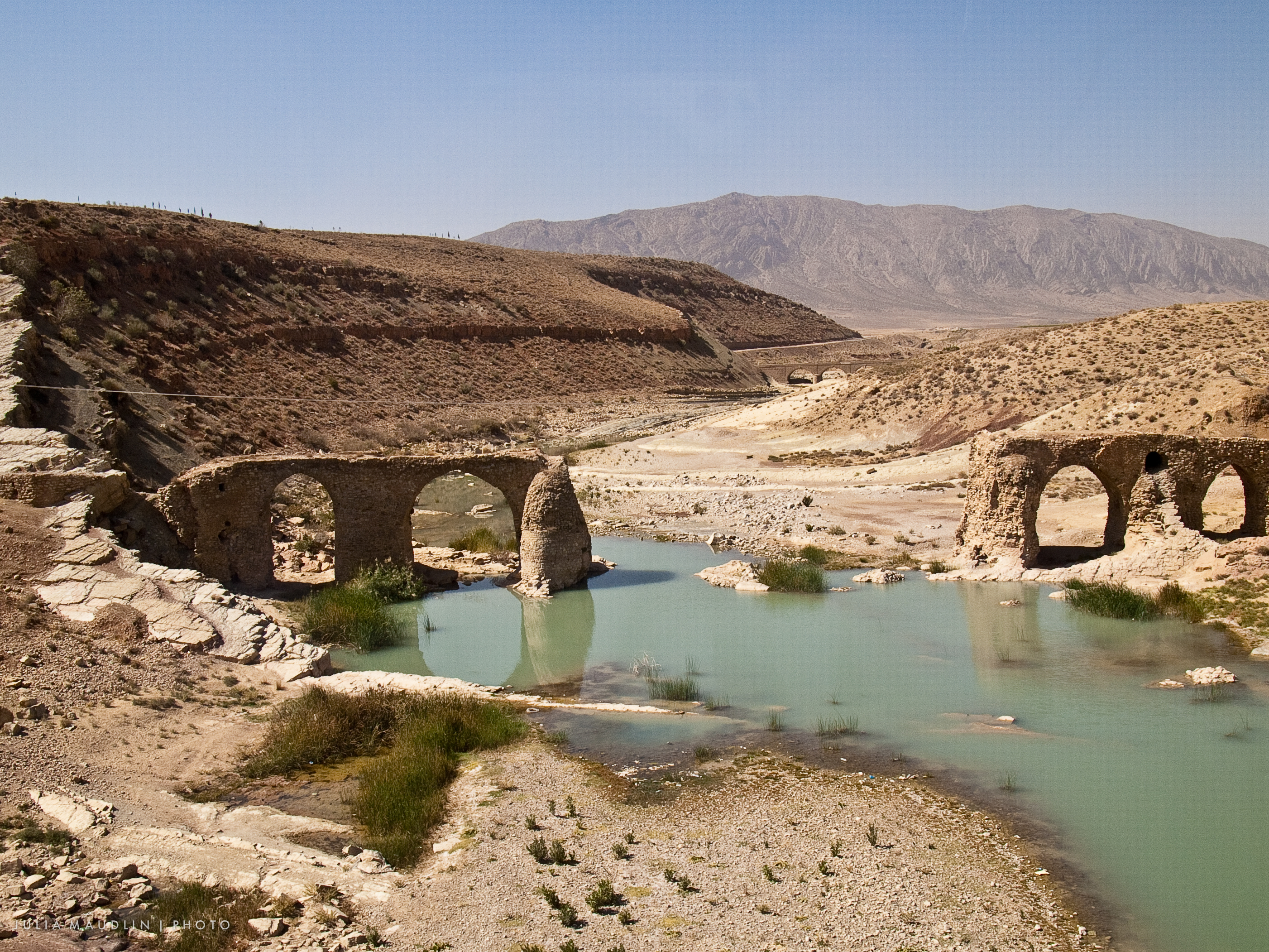 Sassanian-Era Bridge, Iran